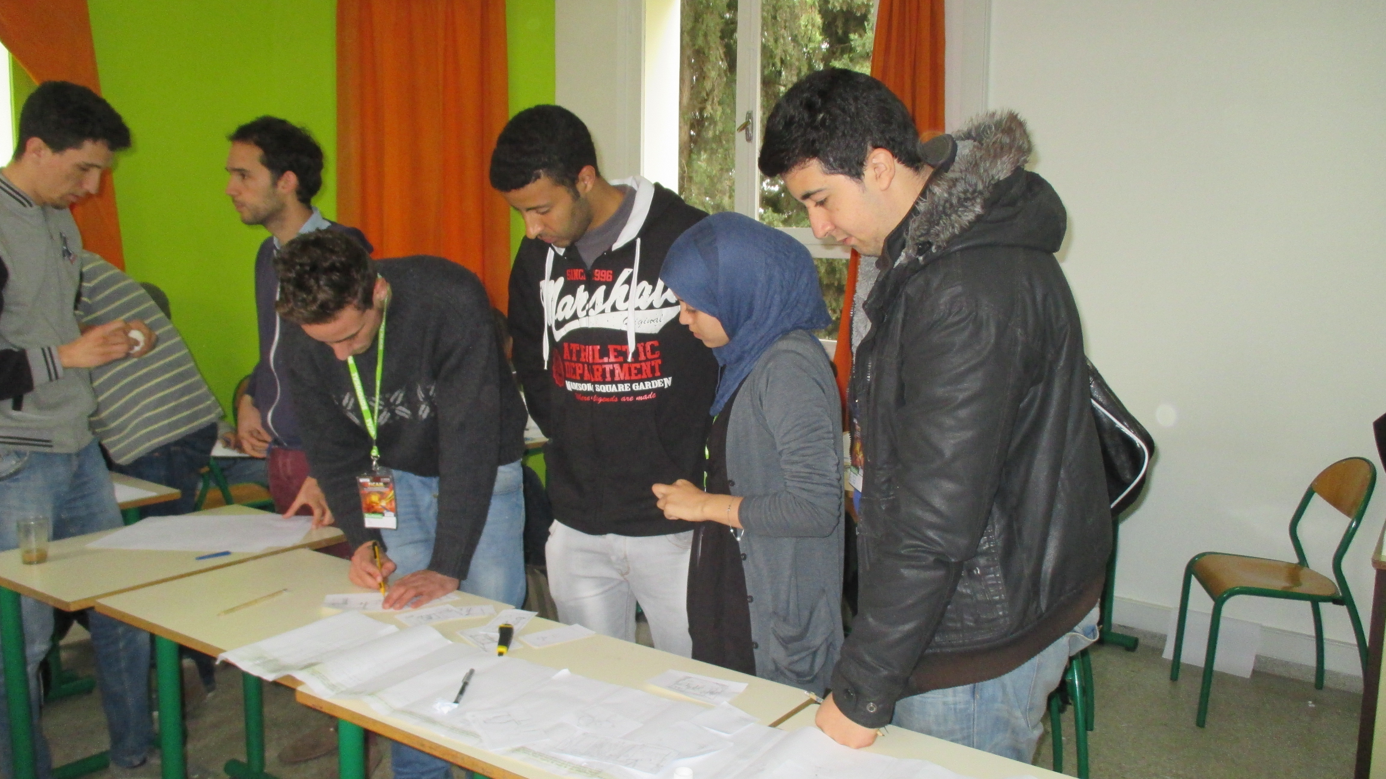 Participation aux ateliers Story-Board au FICAM 2014